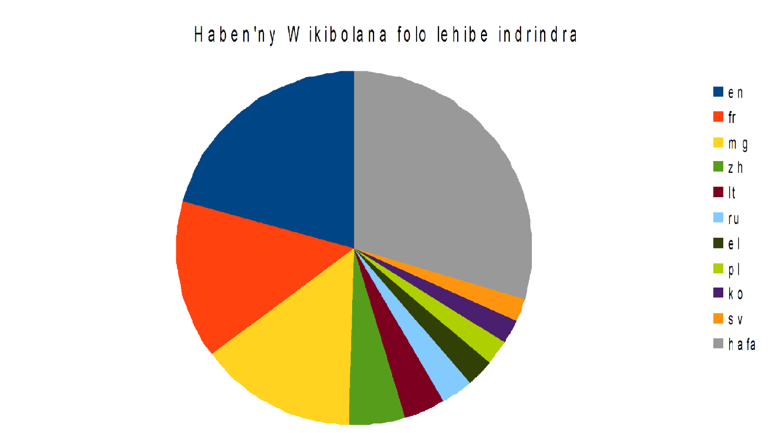 Malagasy: no original description